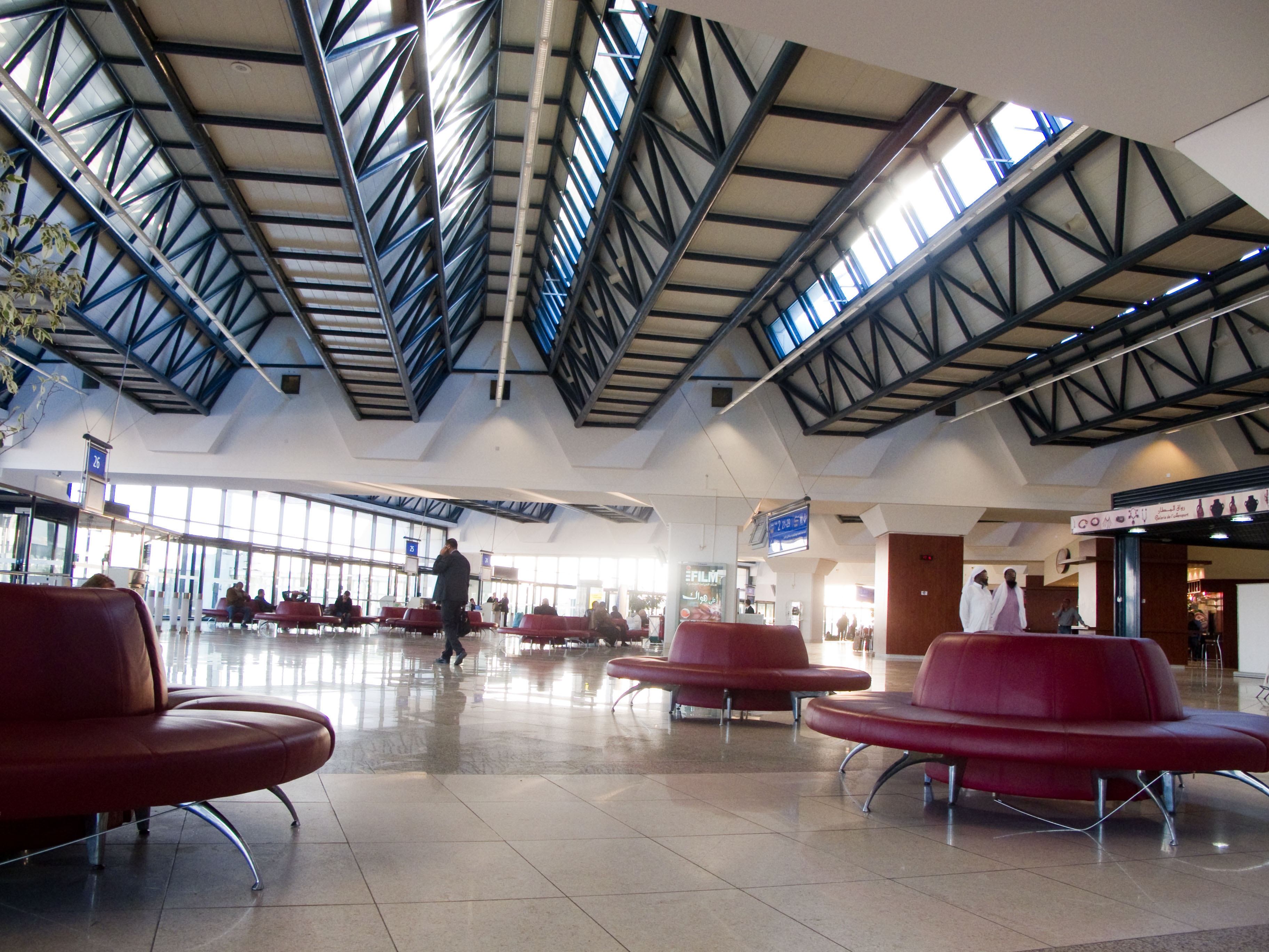 Aéroport Houari Boumediene, Dar El Beida, Alger, Algérie (nouvel aérogare, zone d'embarquement 2)